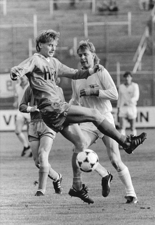 ADN-ZB-Oberst-12.10.1988-Ge.-Berlin: Oberliga- 1. FC Union Berlin - HFC Chemie 1:2 (1:1). Zweikampf zwischen Gisbert Penneke (HFC,l.) und Rene Adamezewski (Union). Information added by Wikimedia users.Name des Spielers vermutlich „René Adamczewski“